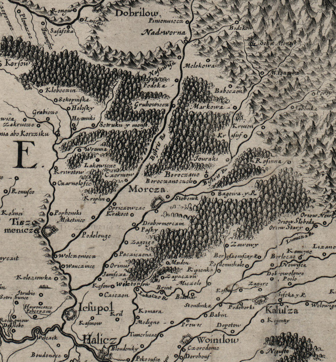 Гійом Боплан працюючи над картою для польського короля в 1645-1650 роках, мандрував по Русі і коли відвідував Галицькі землі, то місцевість, яка тепер відома як Лисець, він записав в себе на карті як Morcza.